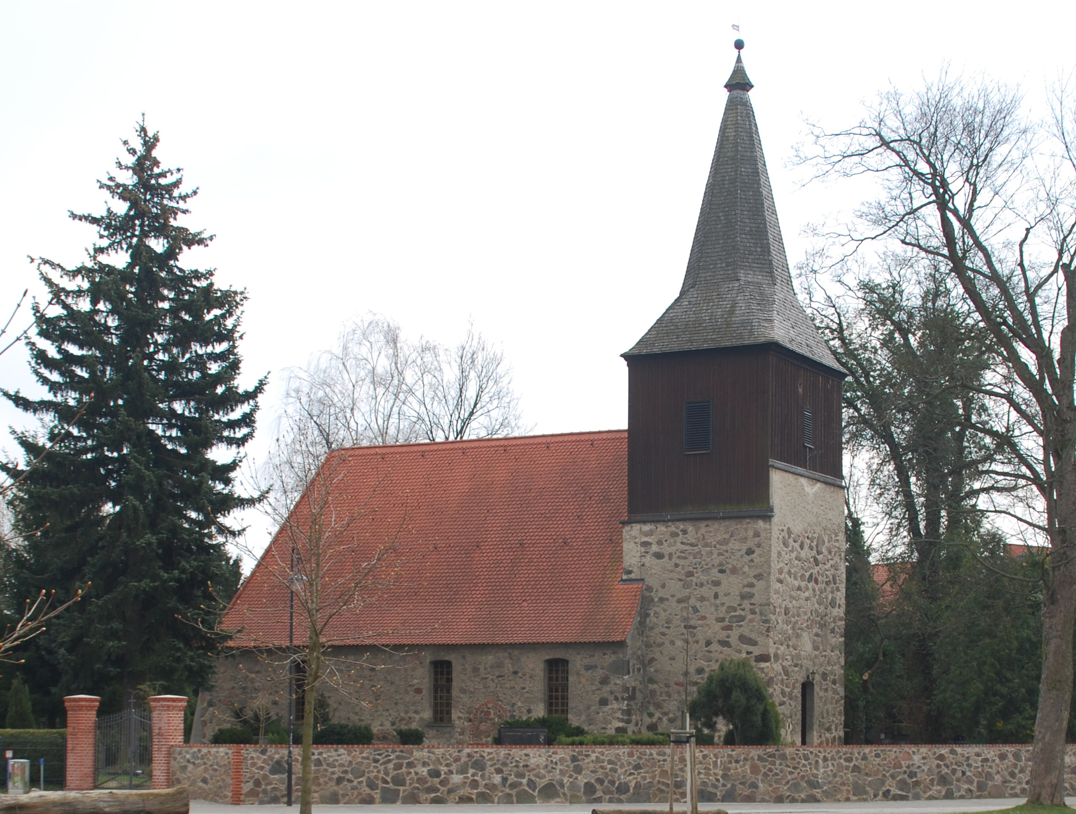 Blick über den Dorrfanger von Kleinschönebeck zur alten Dorfkirche